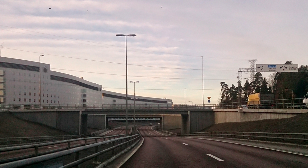 Nya trafikplats längs länsväg 279 vid Rissne och Bankhus 90, mars 2014